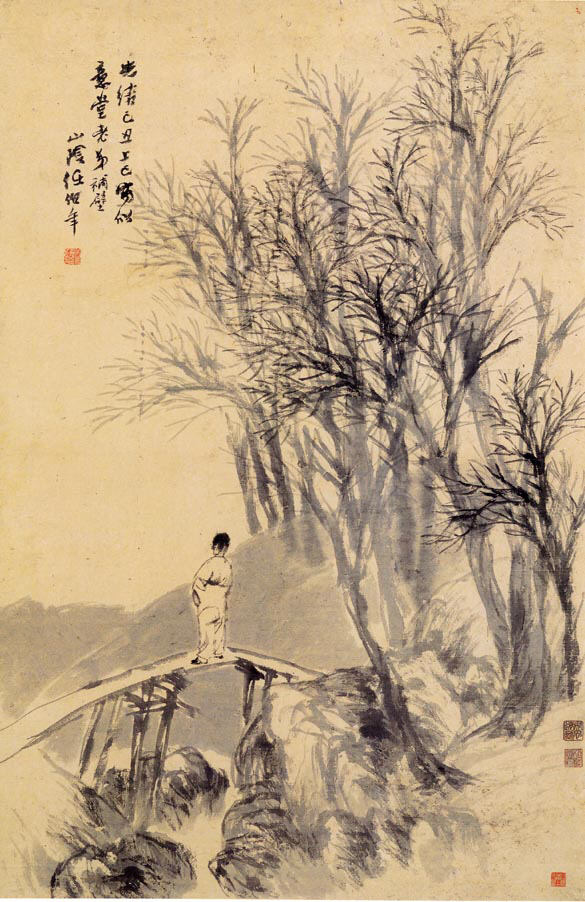 China; Hanging scroll; Paintings